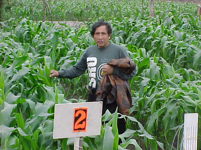 Vista del Cultivo de Maíz Morado